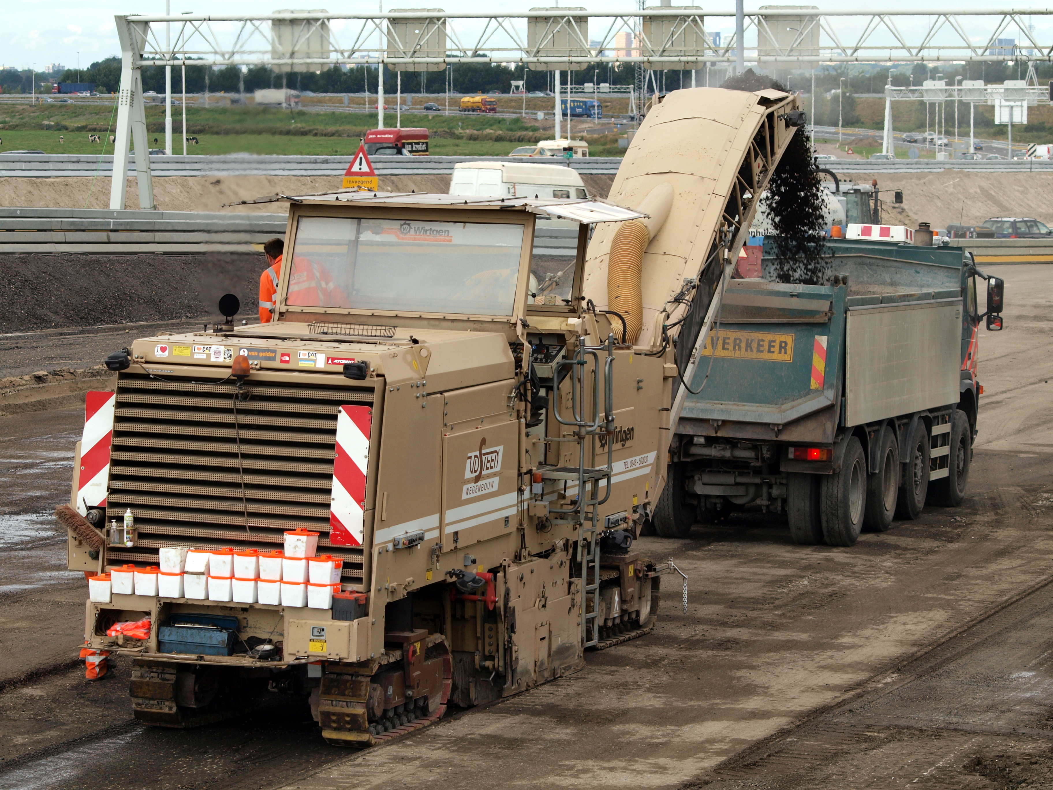 Wirtgen W 2100